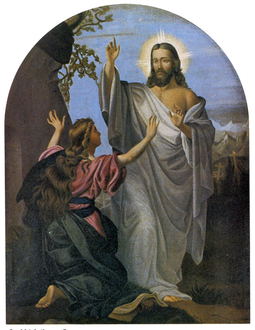 Altaristafla Arngríms málara í Stykkishólmskirkju